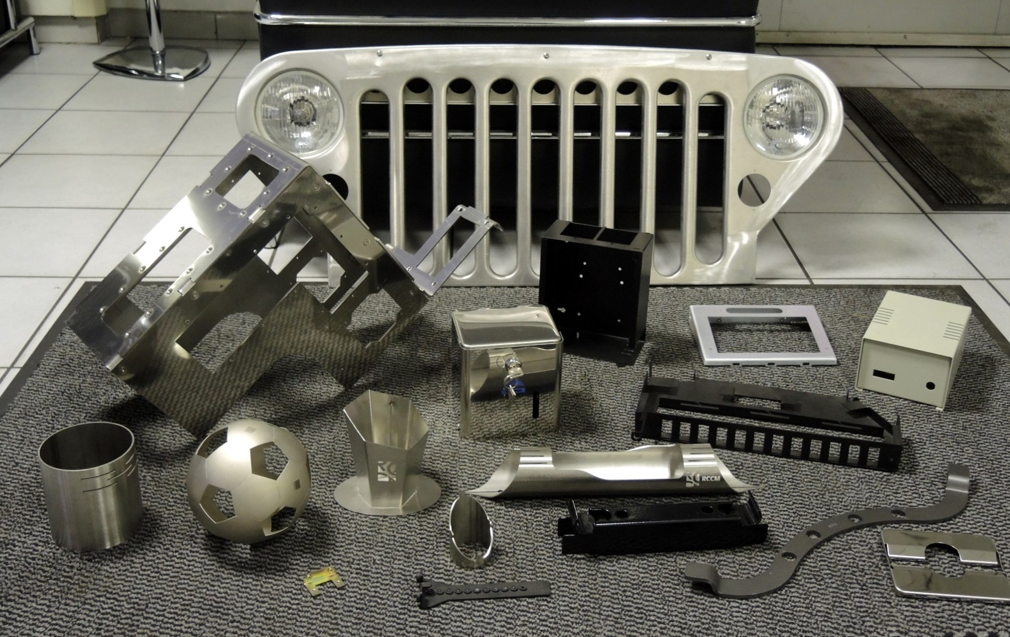 Saint-Clair (Ardèche) RCCM pièces